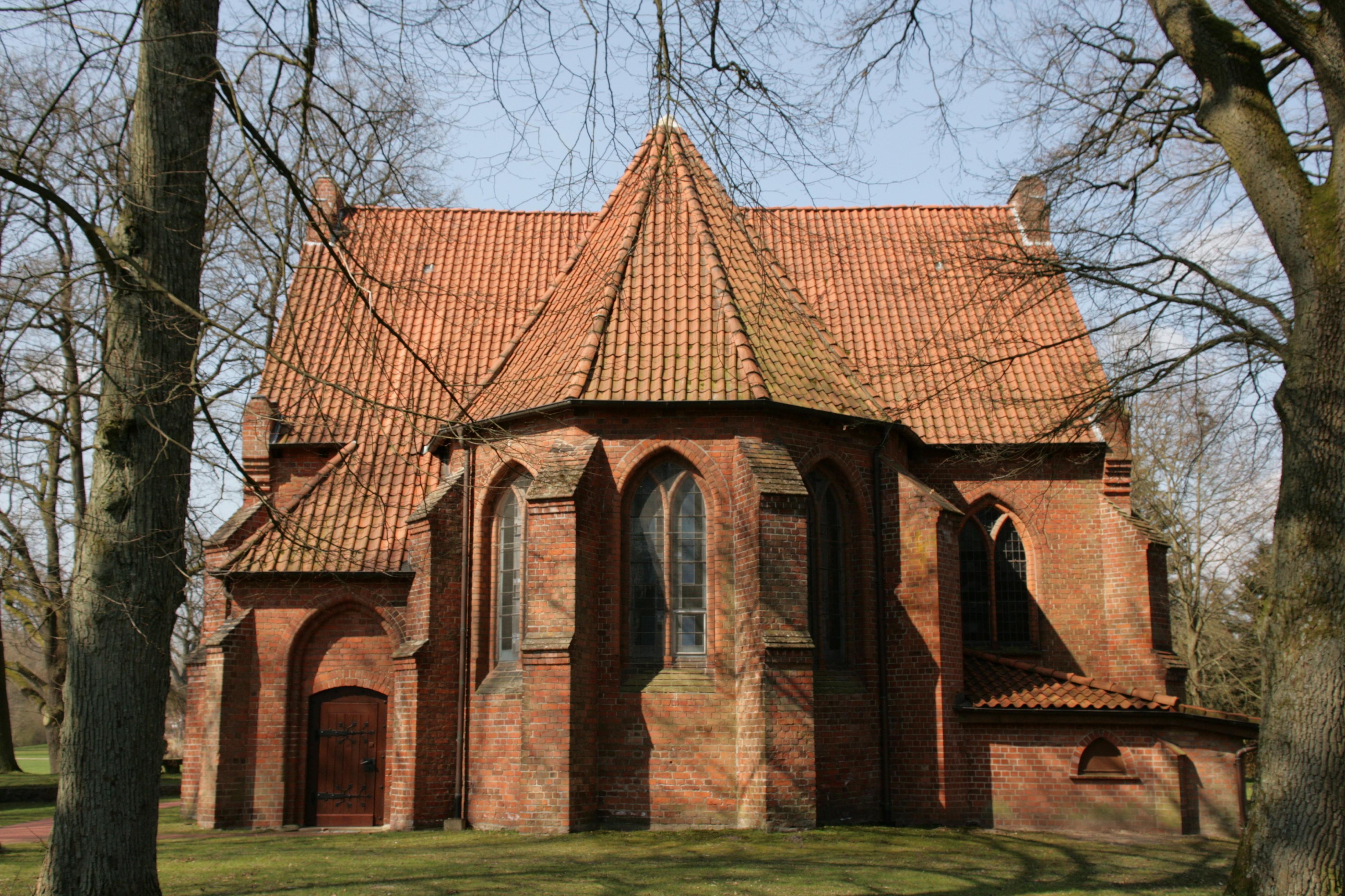 St. Urbani, Kirchgarten in Munster (Örtze)